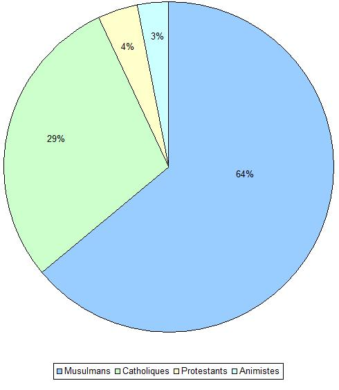 Composition religieuse de la populaton de Tougan (Burkina Faso), lors du recensement de 1996.